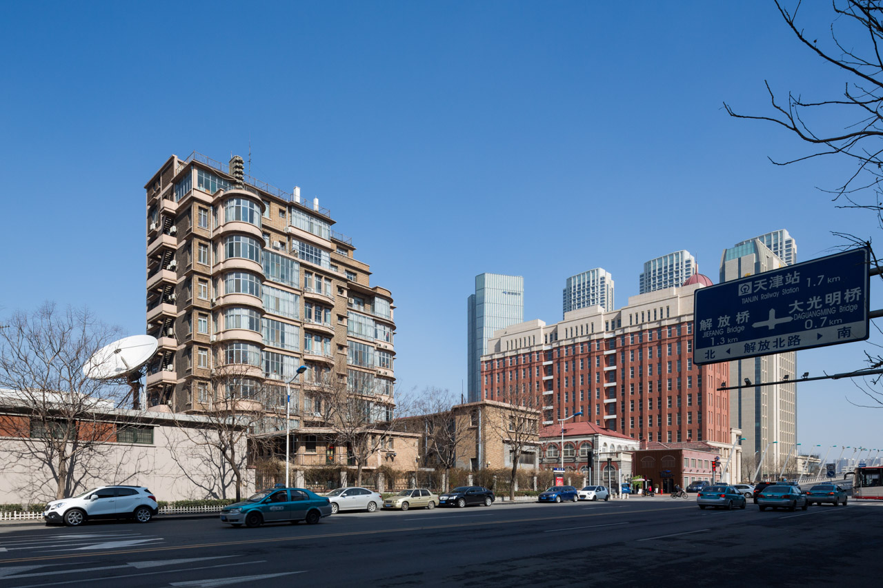 天津利华大楼